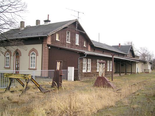 Nádraží v Ochranově